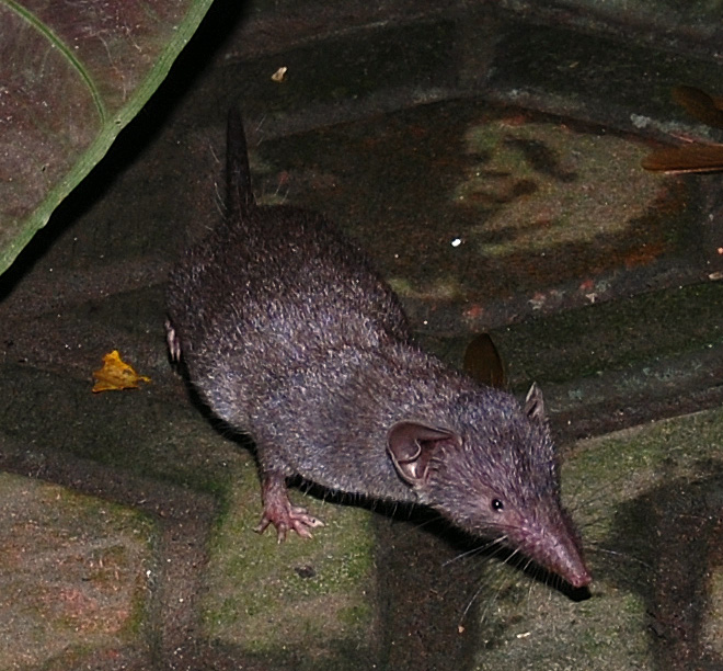 Suncus murinus. Darmaga, Bogor, West Java, Indonesia